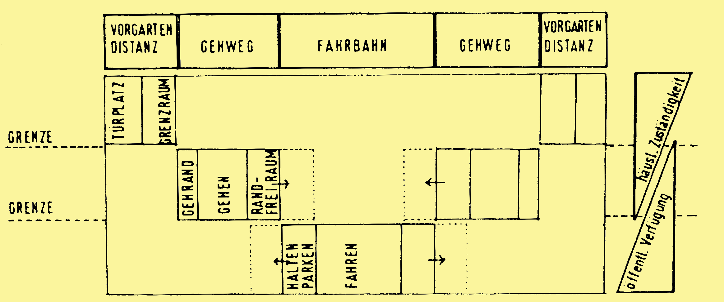 Schema der Zonierung eines Straßenfreiraumes